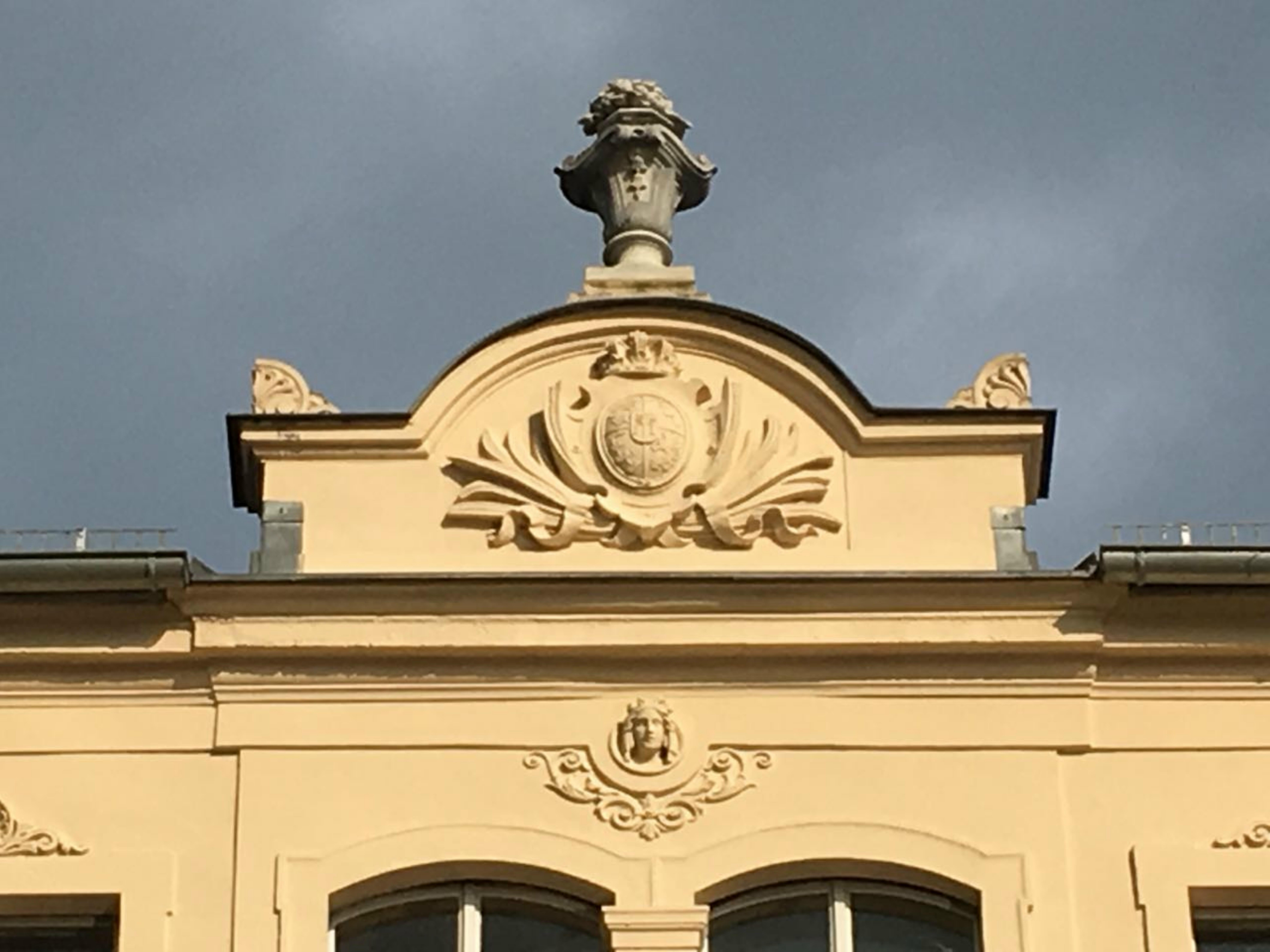 Schloss Lauterbach bei Ebersbach im Landkreis Meißen, mit restaurierten Krönungsvasen April 2018